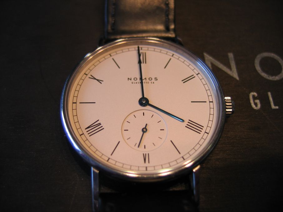 NOMOS Armbanduhr, Modell Ludwig